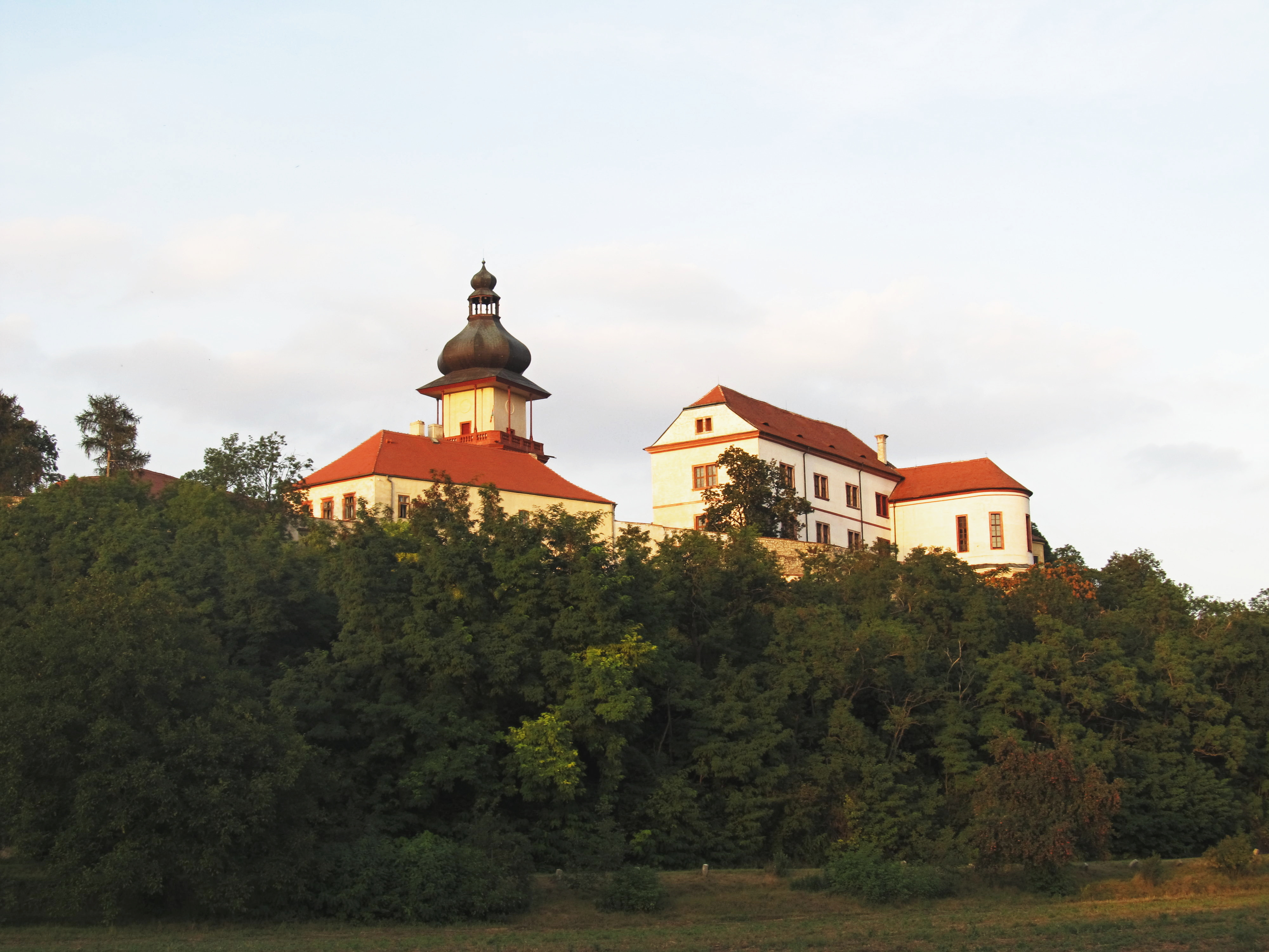 Pohled na zámek od jihozápadu